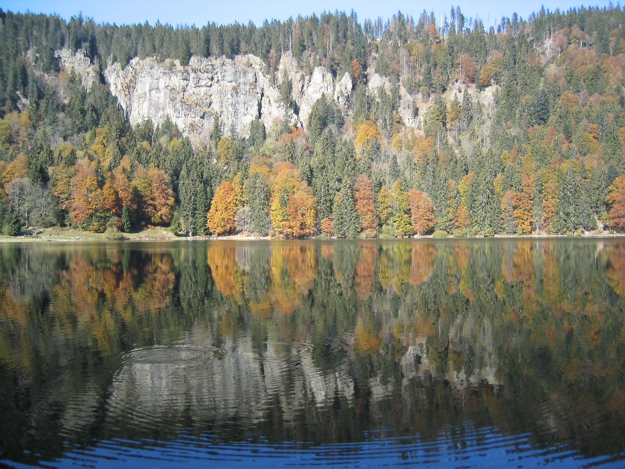 Blick auf den Feldsee im Herbst.